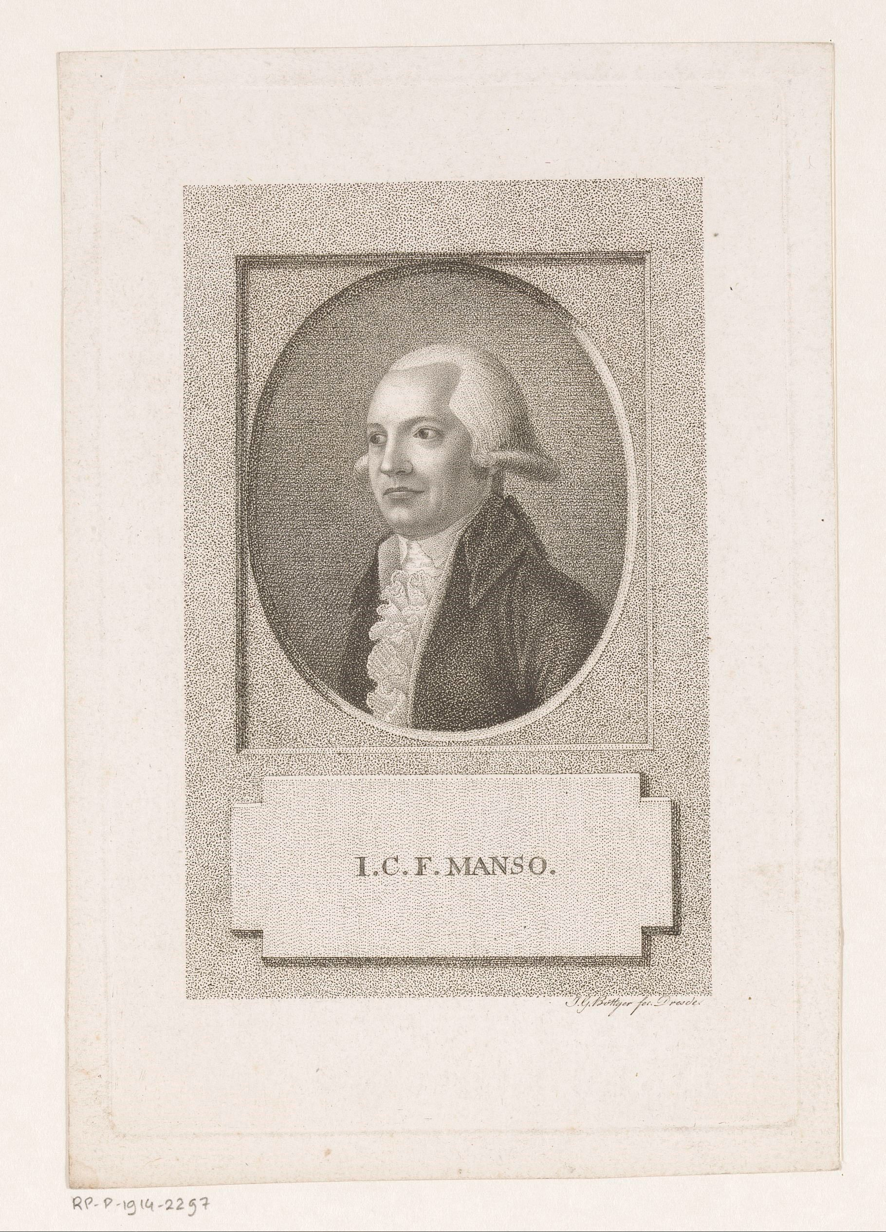 IdentificatieTitel(s): Portret van Johann Caspar Friedrich MansoObjecttype: prent Objectnummer: RP-P-1914-2297Catalogusreferentie: HAB A 13398Opschriften / Merken: verzamelaarsmerk, verso, gestempeld: Lugt 2228VervaardigingVervaardiger: prentmaker: Johann Gottlieb Boettger (vermeld op object)Plaats vervaardiging: DresdenDatering: 1794Materiaal: papier Techniek: stippelwerkAfmetingen: plaatrand: h 169 mm × b 111 mmToelichtingPrent ook gebruikt in: Neue Bibliothek der schönen Wissenschaften und der freyen Künste. dl. 53, eerste stuk. Leipzig: Johann Gottfried Dyck, 1794.OnderwerpWat: historical personsWie: Johann Caspar Friedrich MansoVerwerving en rechtenVerwerving: aankoop 1905Copyright: Publiek domein